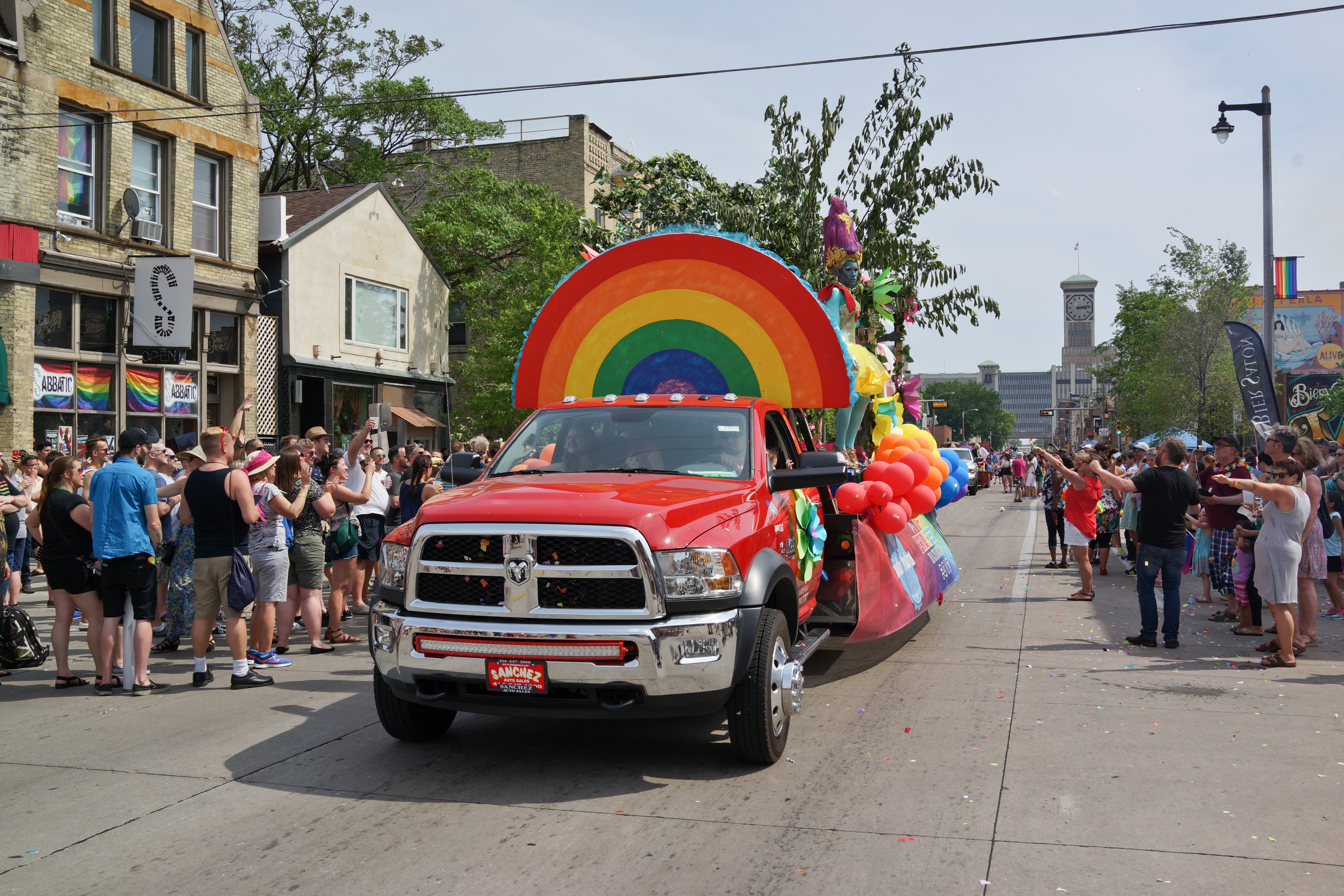 Milwaukee Pride Parade 2017